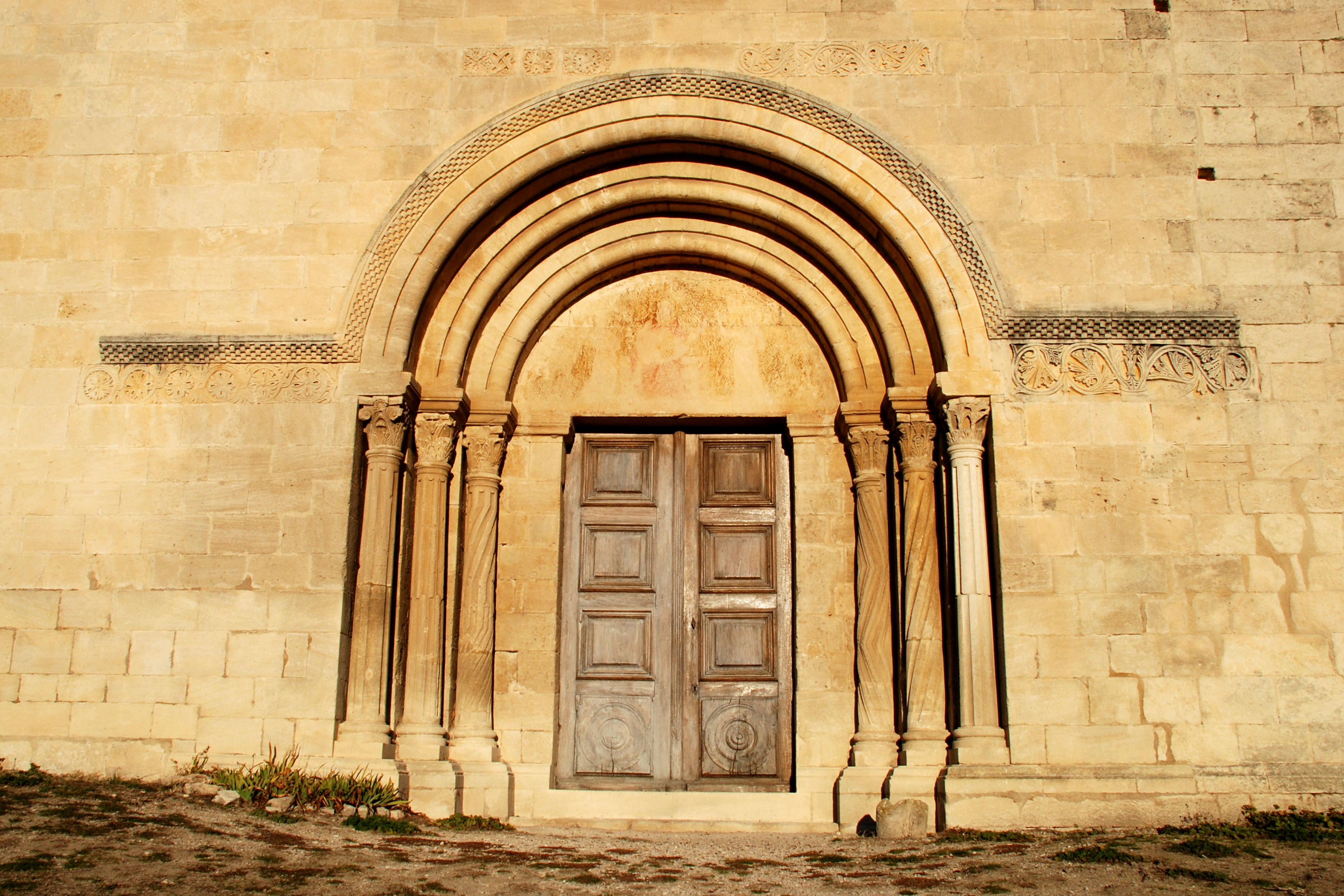 France - Provence - Prieuré Notre-Dame de Salagon